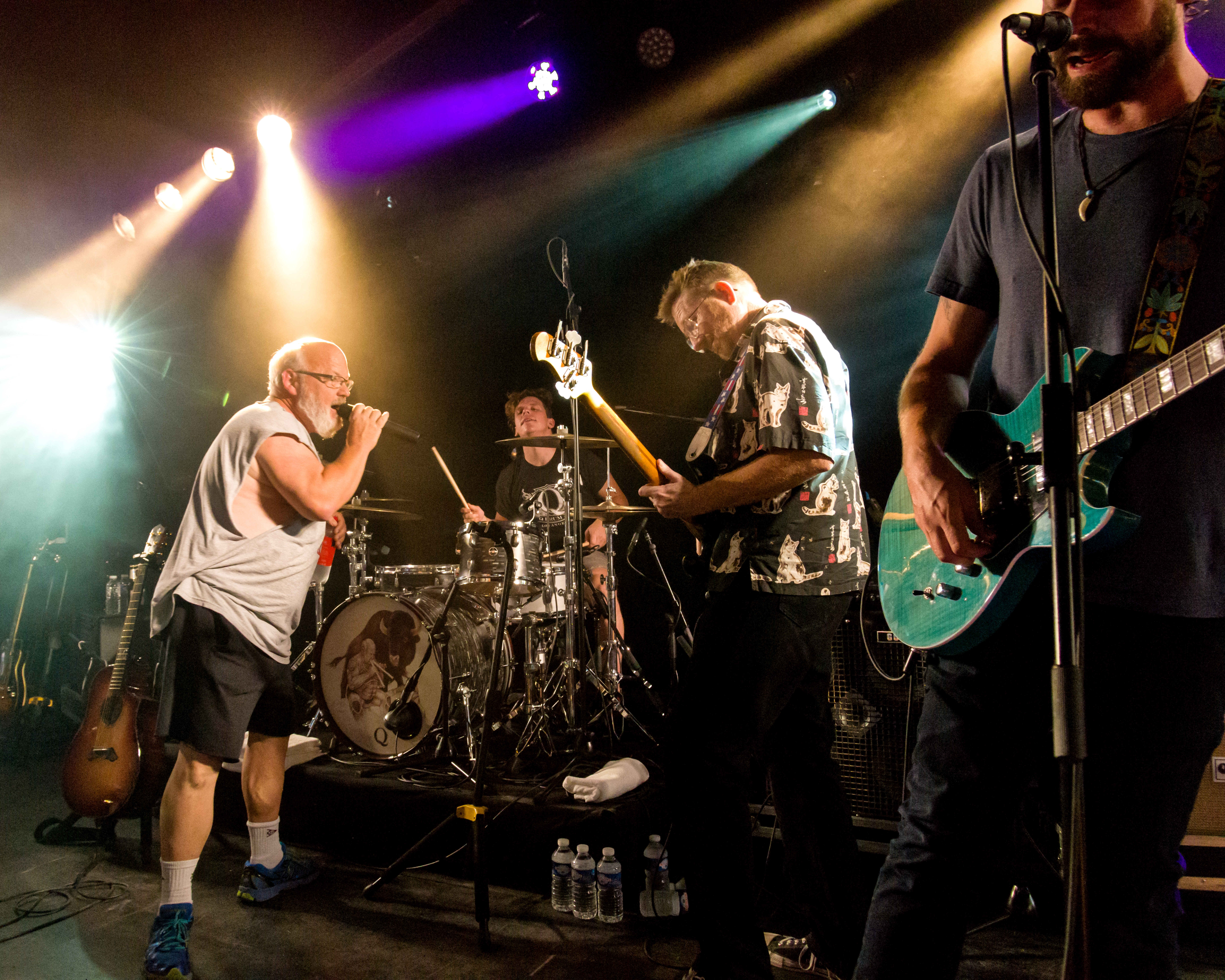 Bilder vom Zelt Musik Festival 2017 in Freiburg im Breisgau Kyle Gass Band